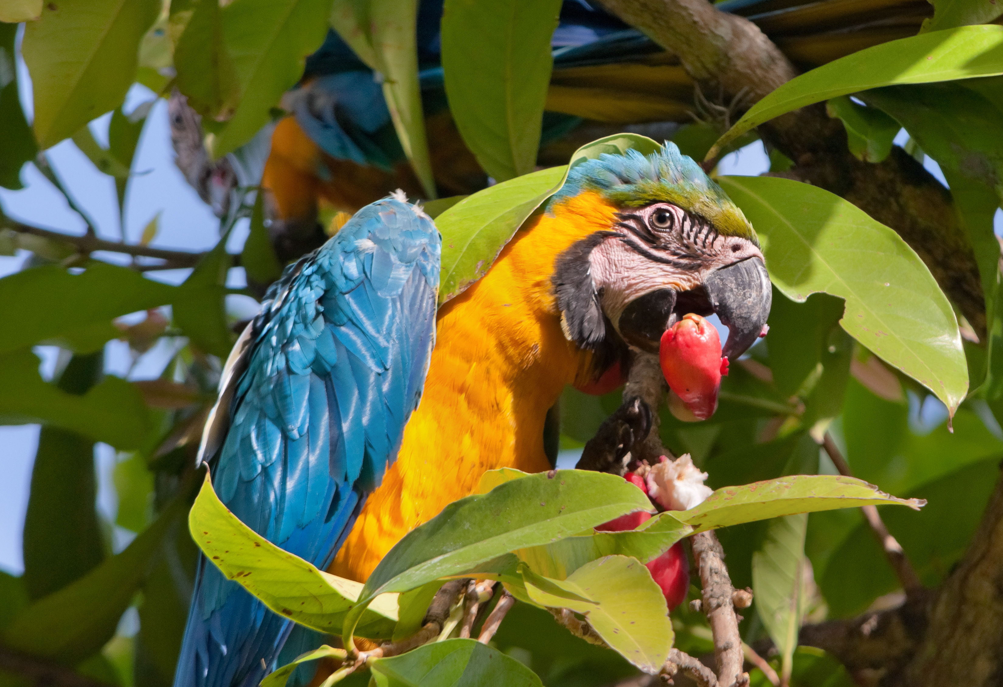 Guacamaya amarilla y azul, Ara ararauna, en Caracas, Venezuela.